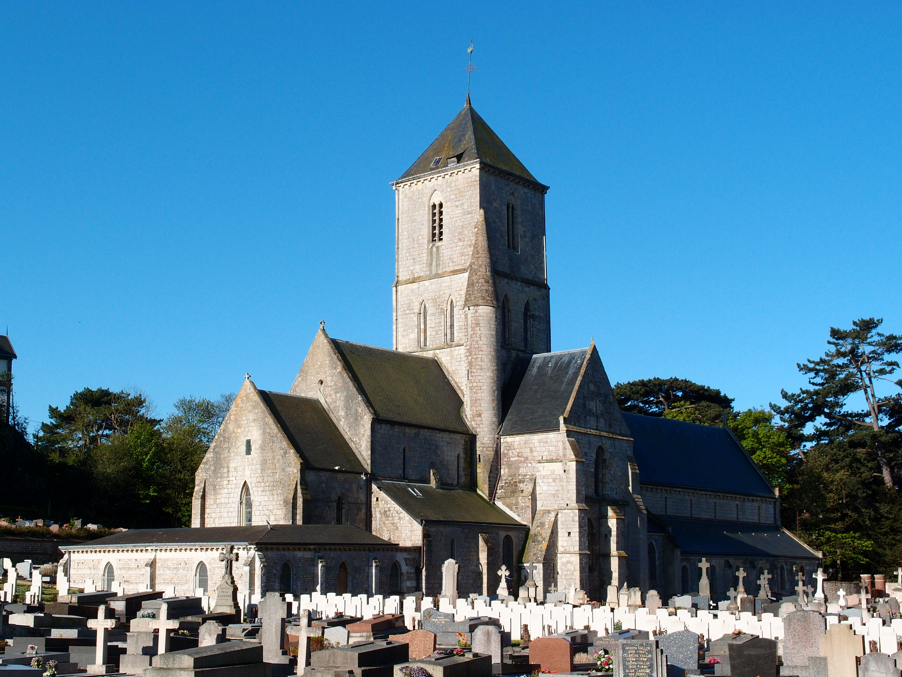 Étretat: Liebfrauenkirche (franz.: Église Notre-Dame d'Étretat) Datum: 13.05.2012 Urheber: M. Pfeiffer alias Benutzer:Gordito1869 Quelle: privates Fotoarchiv des Urhebers